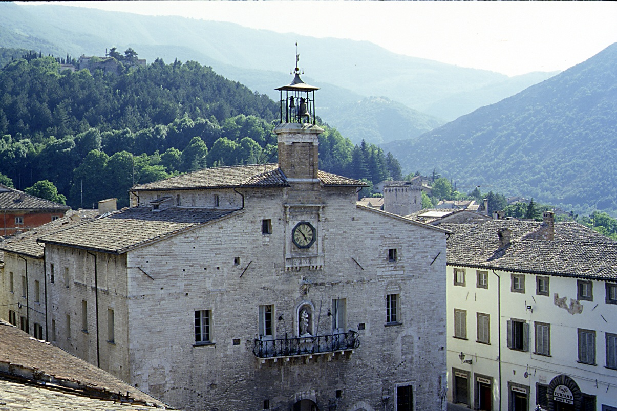 Palazzo Pubblico del comune di Cagli